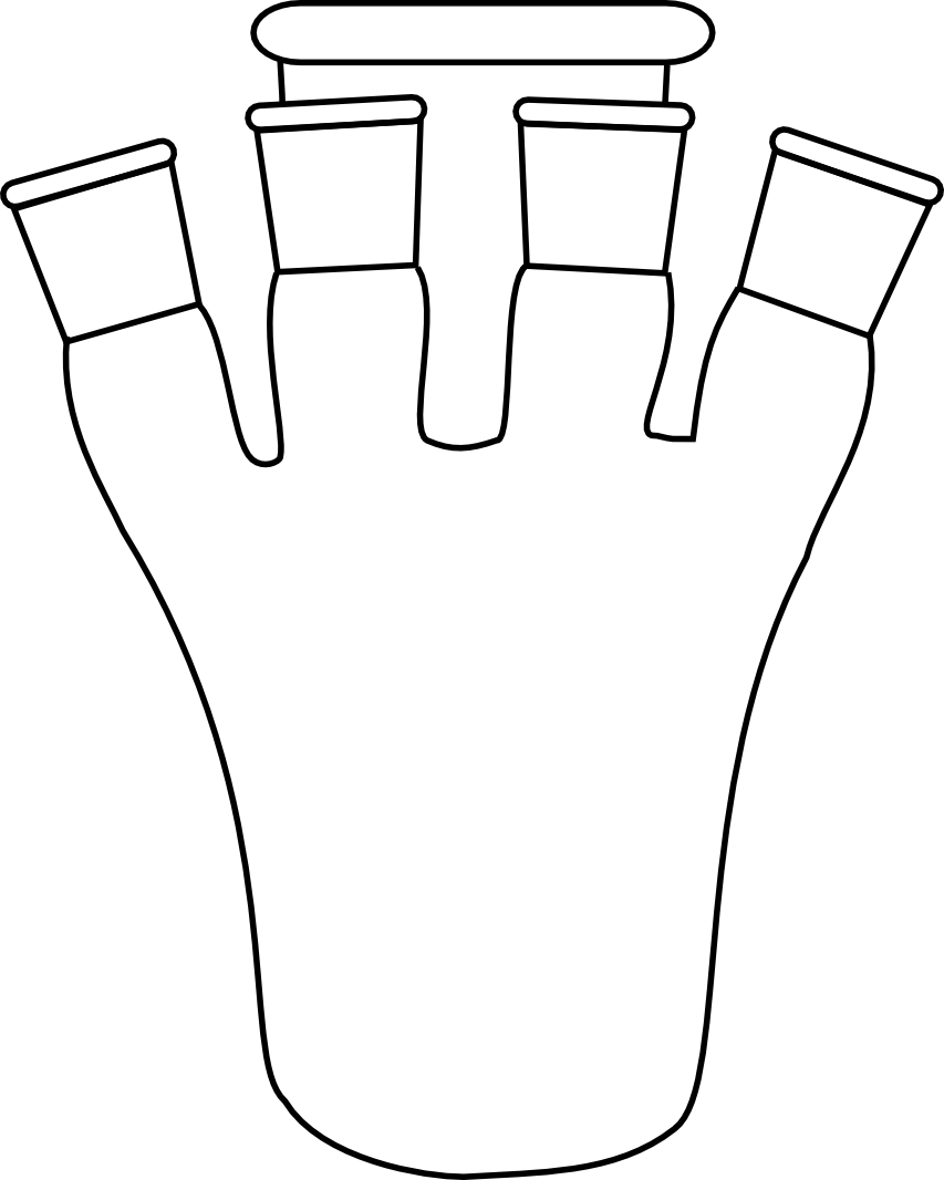 Sulfierkolben